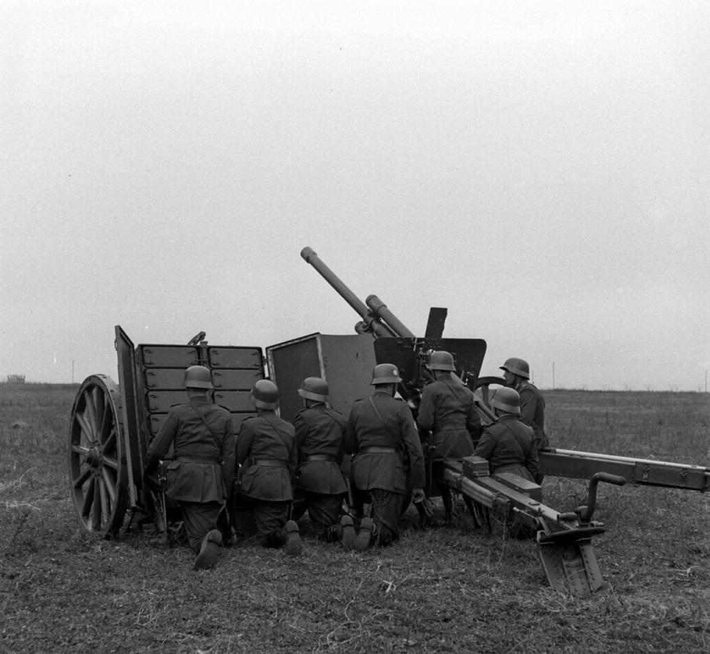 Аргентинские артиллеристы на учениях.